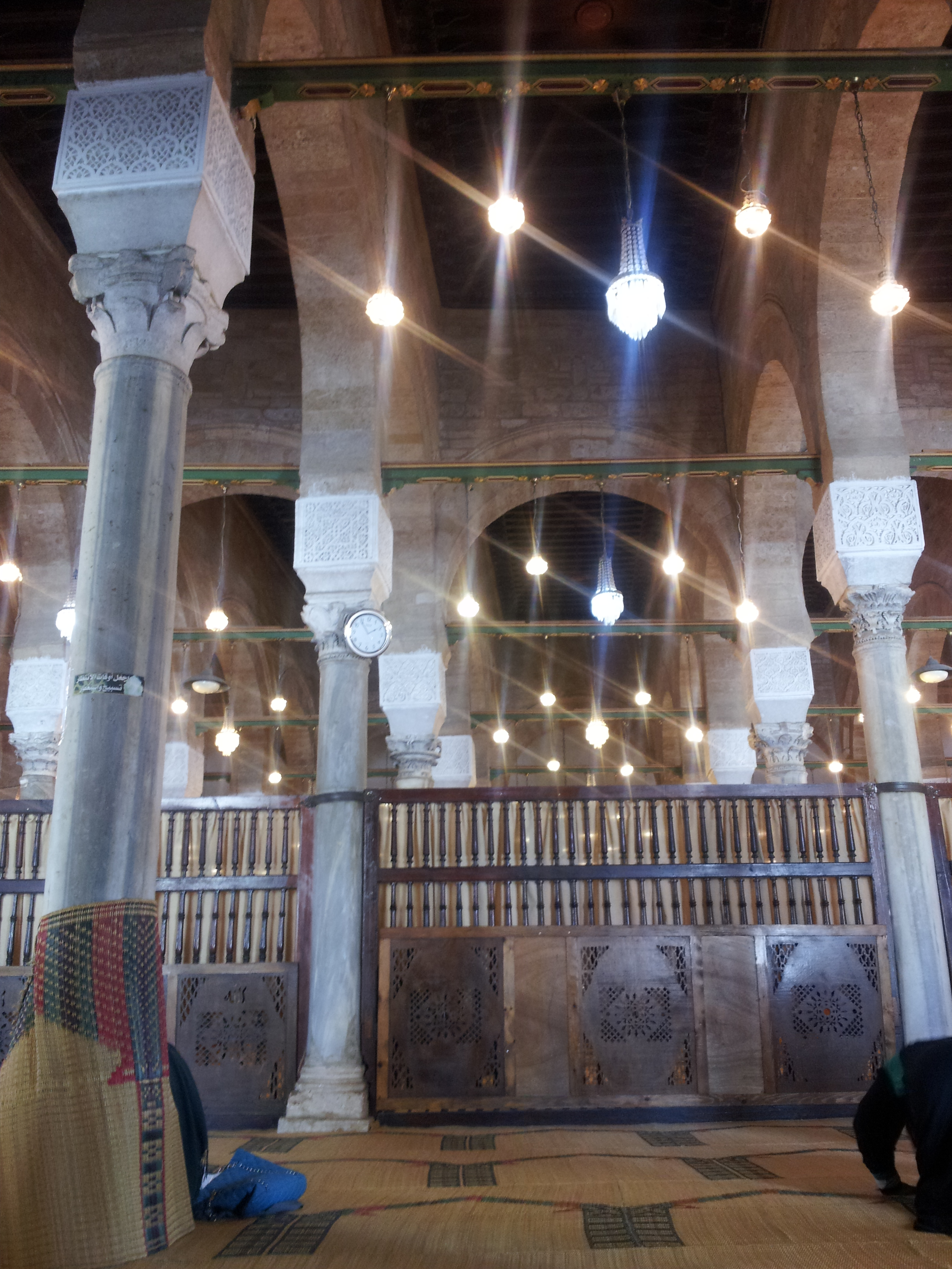 Grande Mosquée (Djamaa Zitouna), Tunis